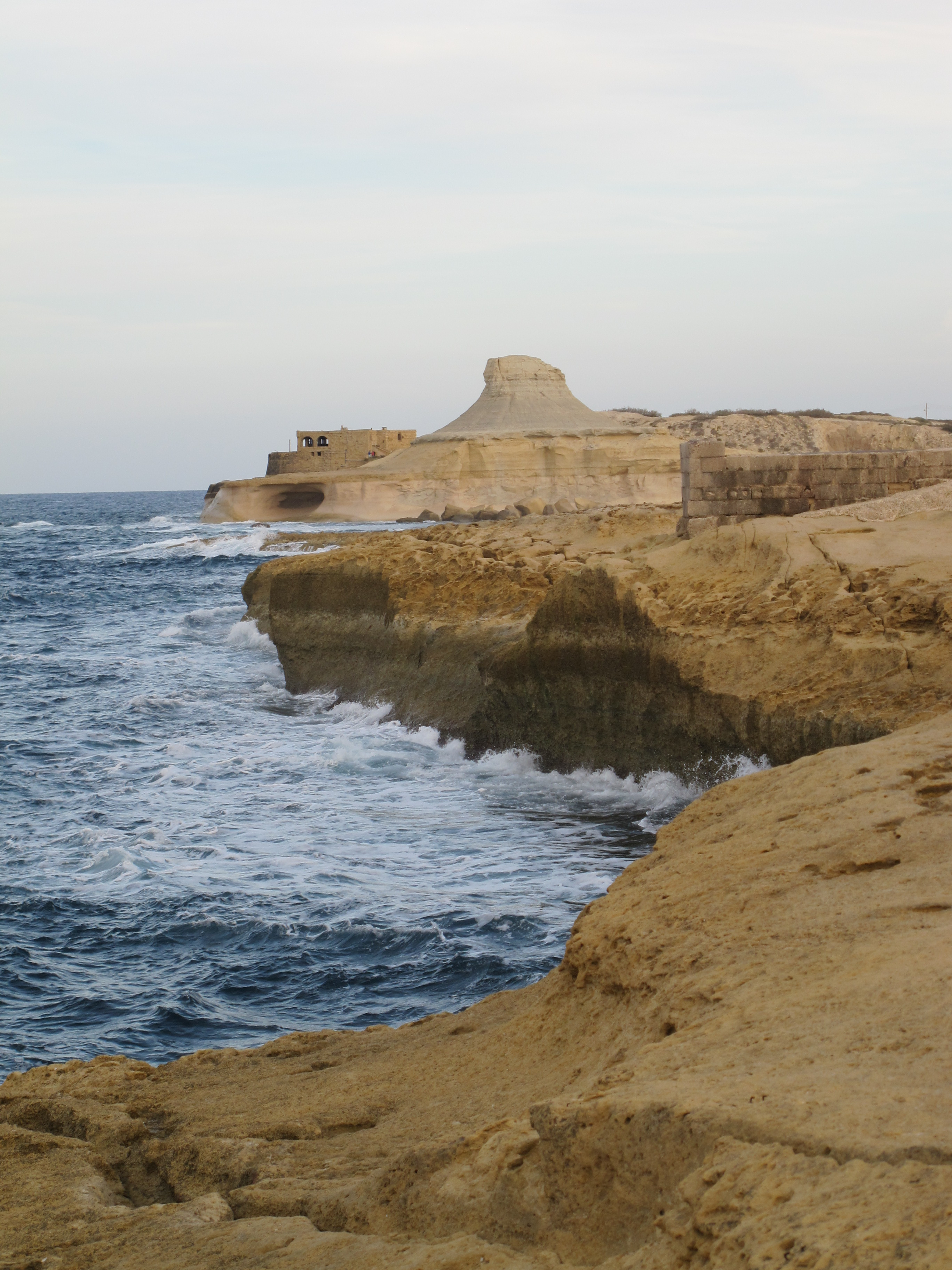 Xwejni Bay Nov 2014